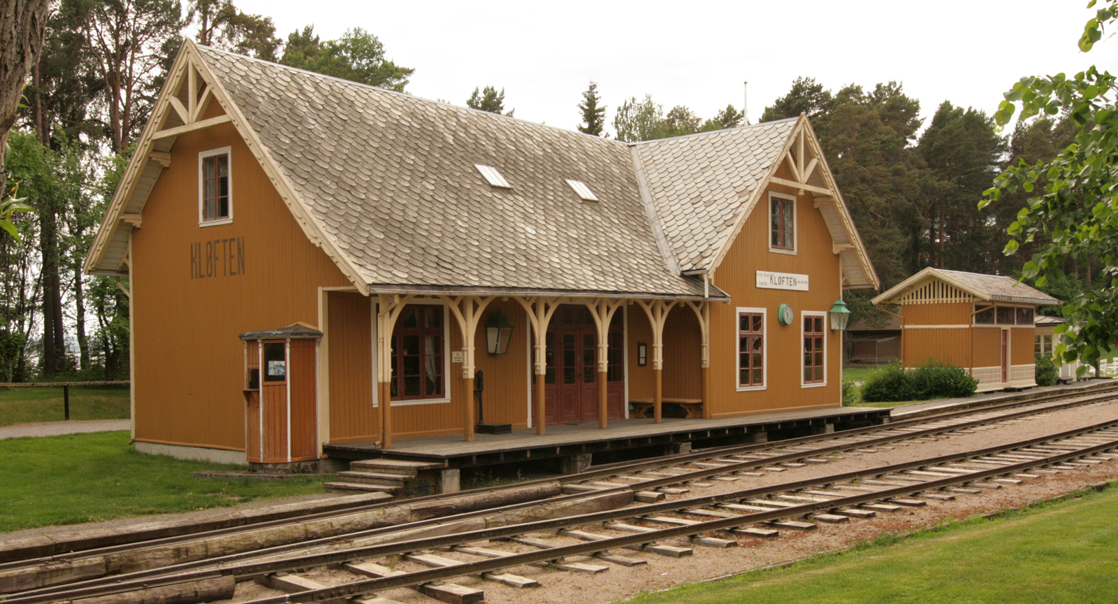 Gamle Kløfta stasjon på Hovedbanen, i dag på Norsk jernbanemuseum. Bygd 1854; arkitekt Heinrich Ernst Schirmer og Wilhelm von Hanno.